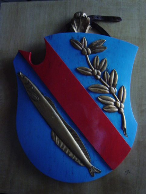 Blason en bois sculpté vernis famille Ciciarelli de Cicerello da Lago